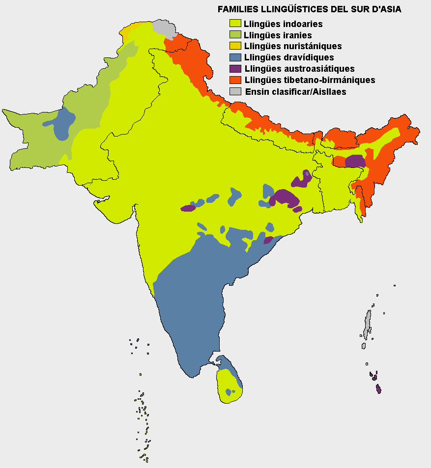 Mapa a color de les llingües falaes nel sur d'Asia.